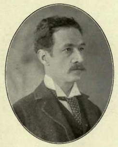 Louis Wain Photo: Lascelles & Co.